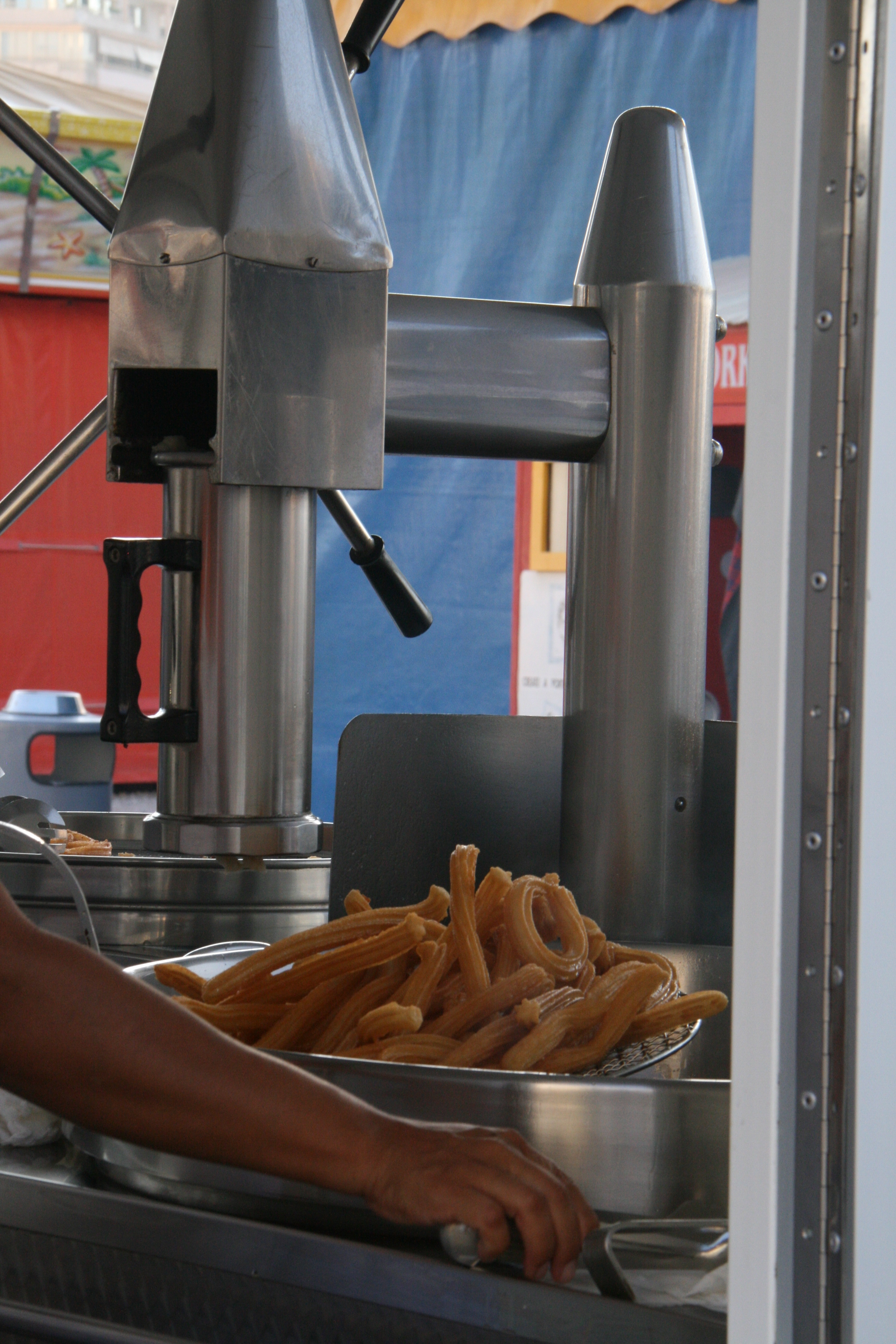 Máquina de hacer churros